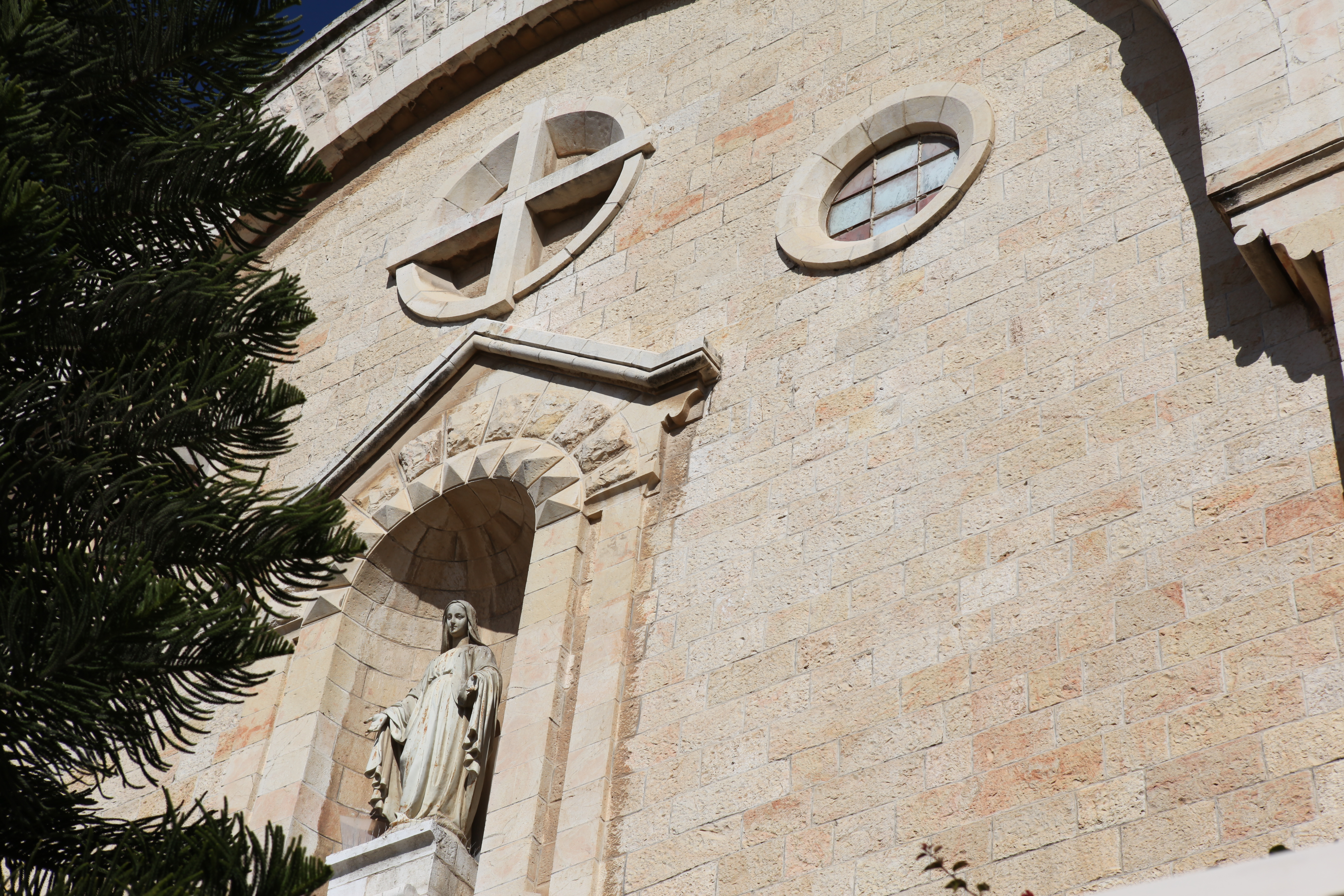 Jerusalem Jerusalem